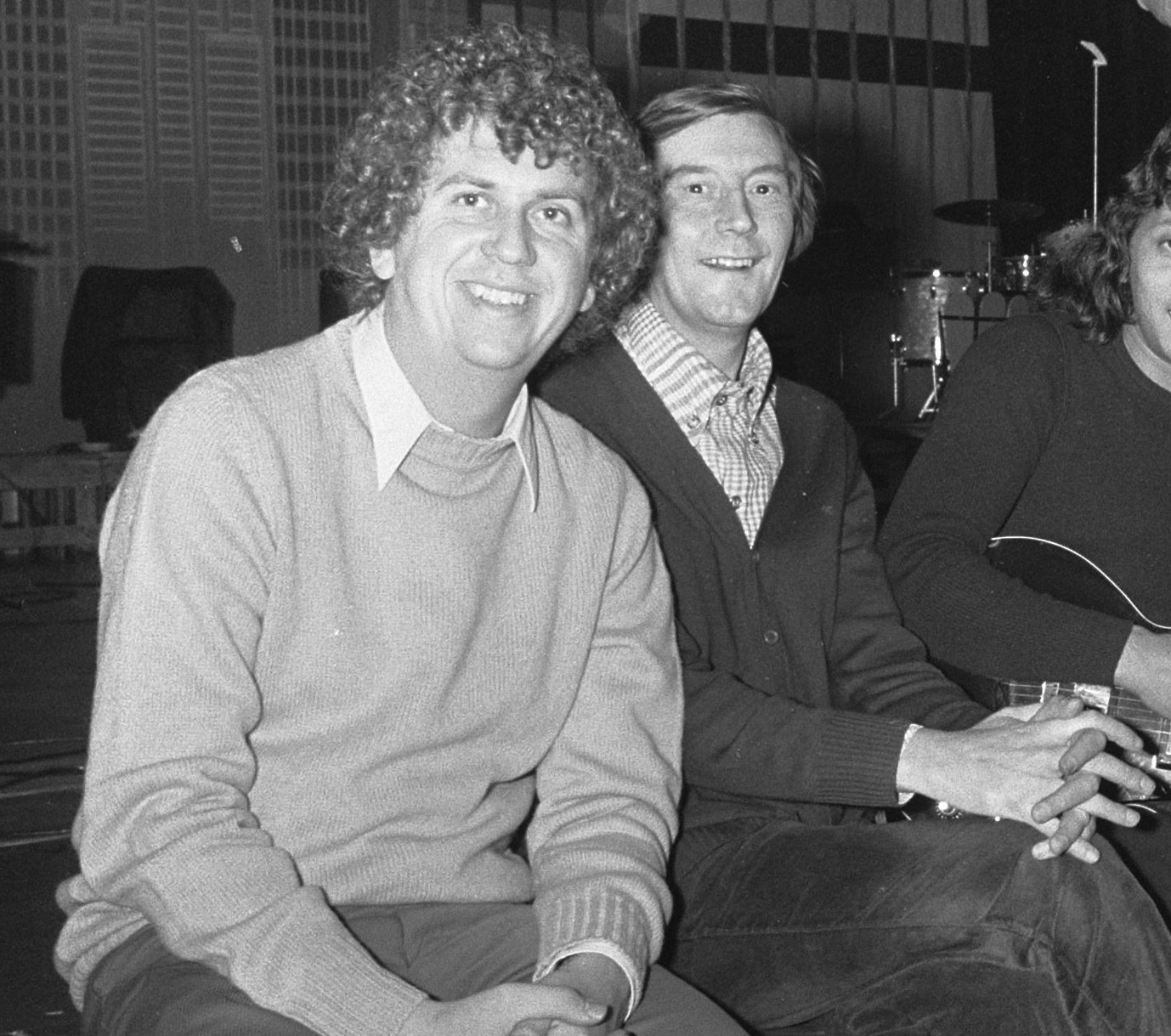 Collectie / Archief : Fotocollectie Anefo Reportage / Serie : [ onbekend ] Beschrijving : Seth Gaaikema repeteert in Carré voor zijn show Elf verdwazingen: Seth Gaaikema en medewerkers Datum : 6 november 1972 Locatie : Amsterdam, Noord-Holland Trefwoorden : shows, theaters Persoonsnaam : Gaaikema, Seth Fotograaf : Peters, Hans / Anefo Auteursrechthebbende : Nationaal Archief Materiaalsoort : Negatief (zwart/wit) Nummer archiefinventaris : bekijk toegang 2.24.01.05 Bestanddeelnummer : 926-0043 Reacties Geplaatst door Maaike op 19 januari 2014 - 16:31. Persoonsnamen: Riem de Wolff, Ruud de Wolff, Frans Drabe, Jan Ypema, Henk van Dijk, Frans Rettich